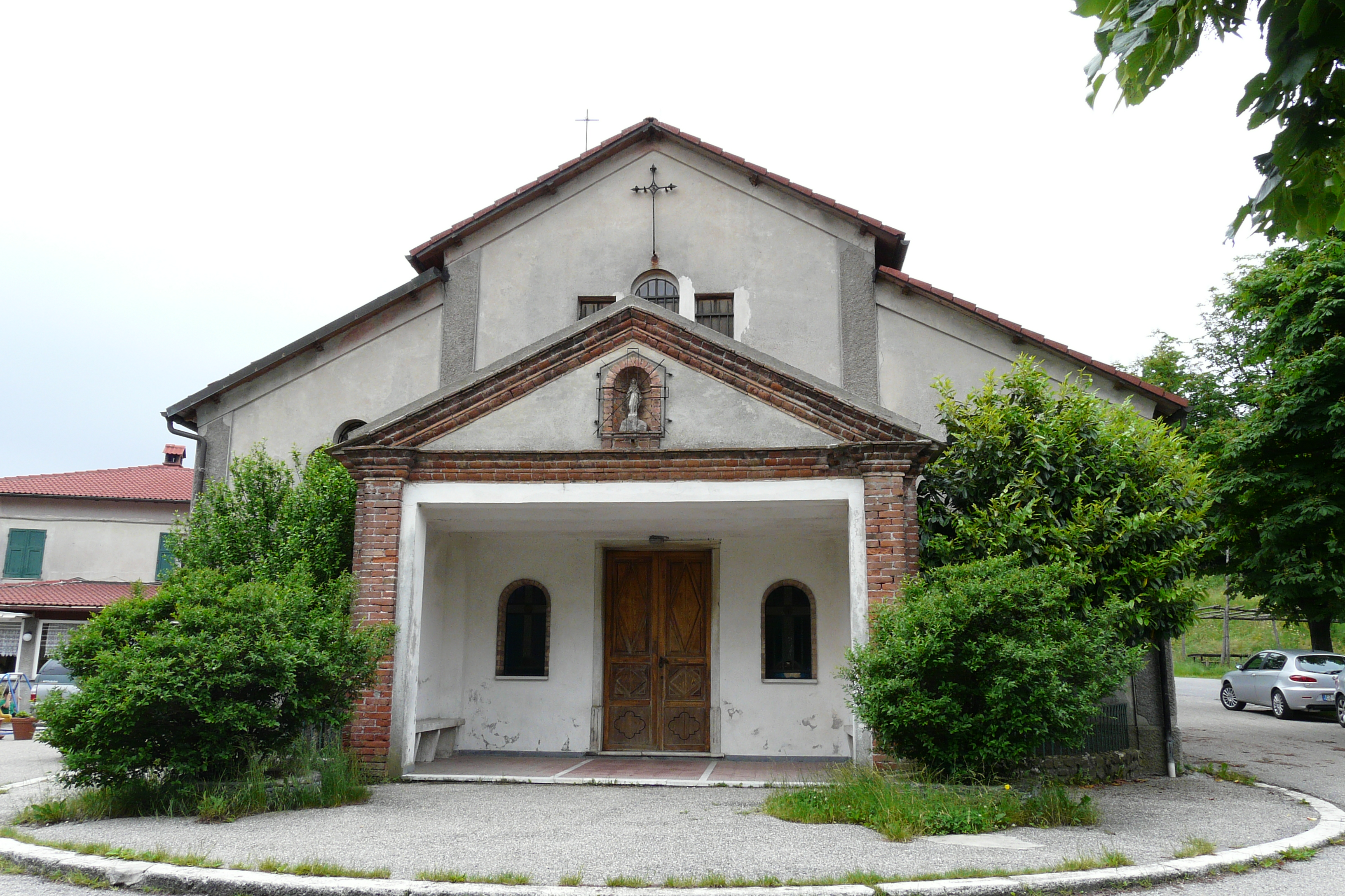 Santuario della Bastia, Busalla, Liguria, Italia